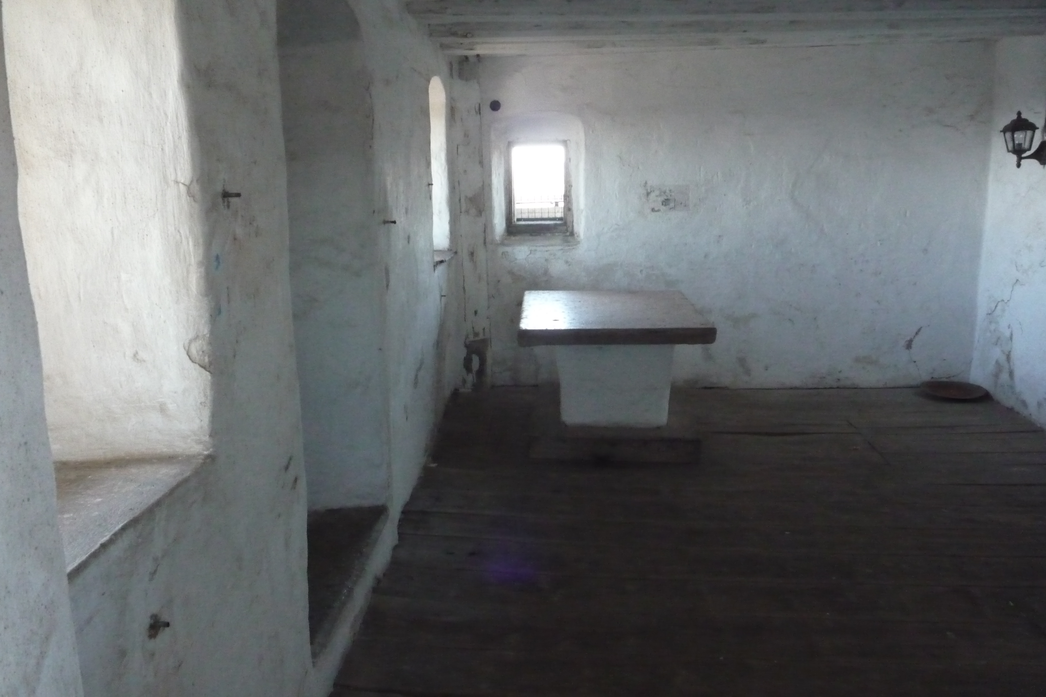 alter Altar